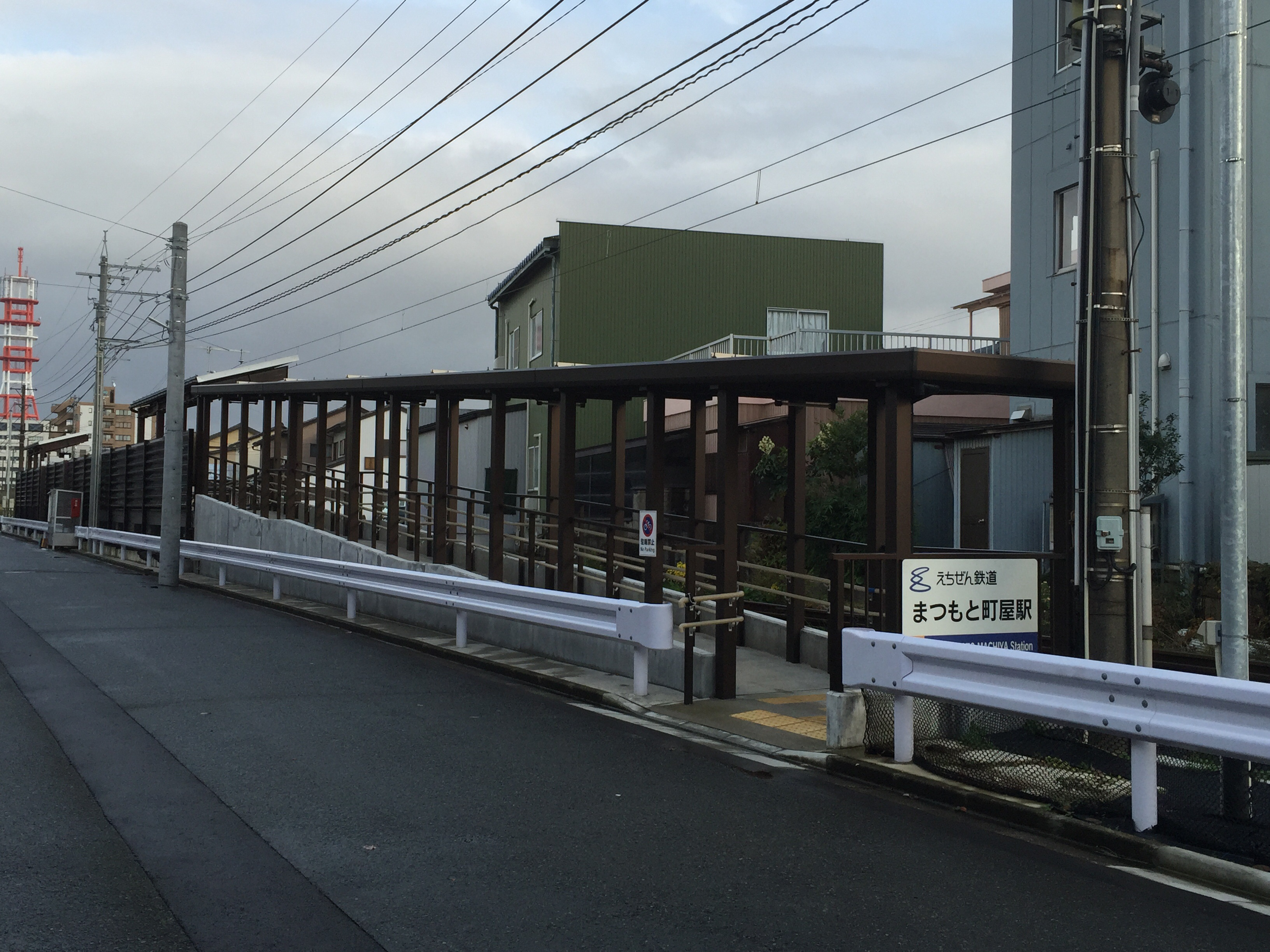 えちぜん鉄道 まつもと町屋駅